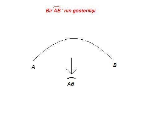 Bir çember yayı ve gösterilişi.